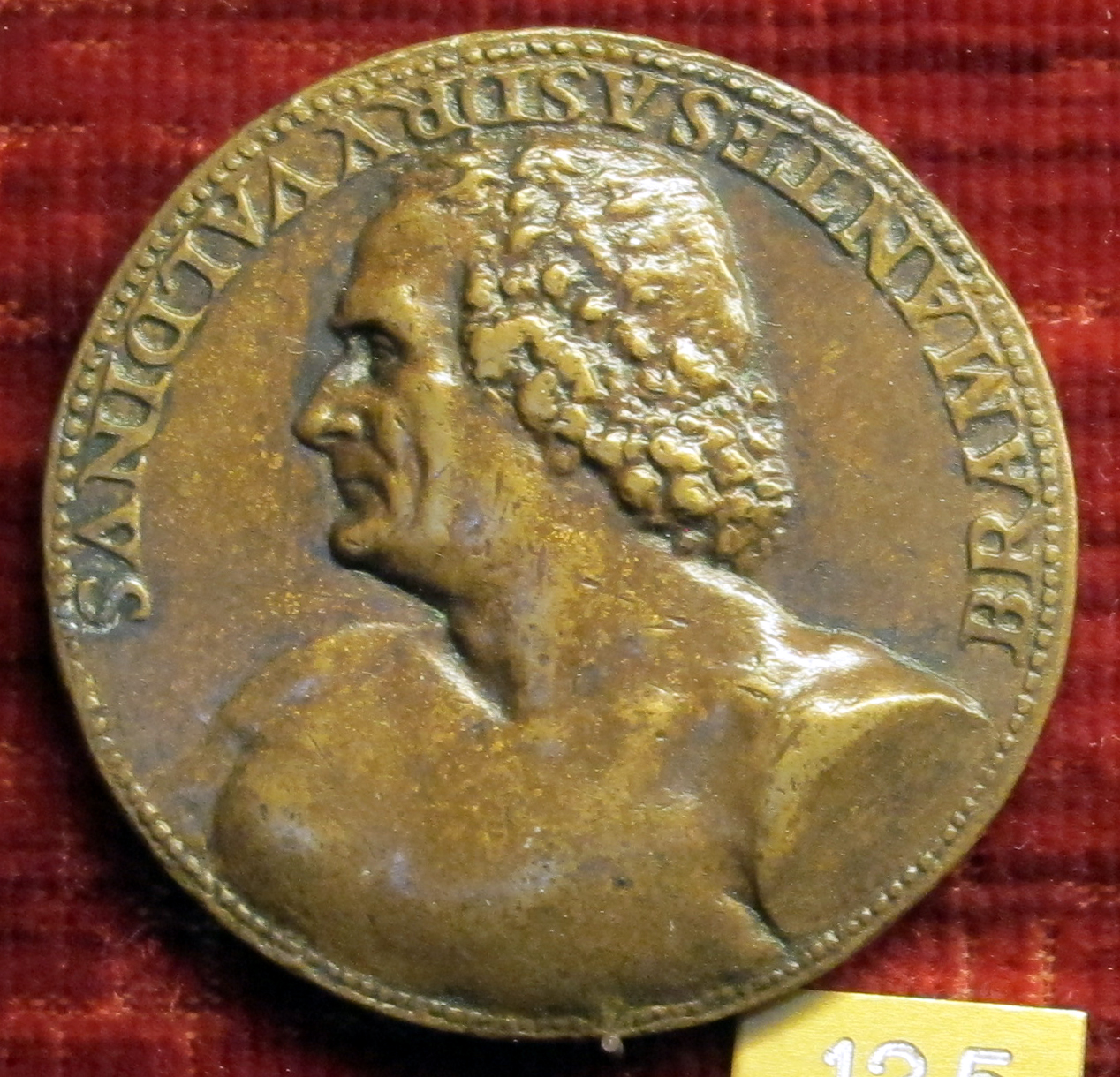 Medaglia di Donato Bramante (1444-1514)